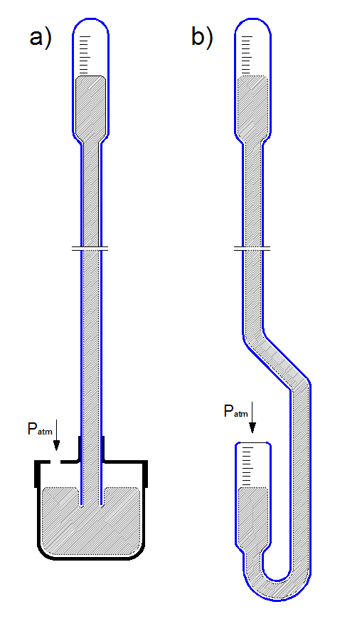 Barometr hydrostatyczny. Autor rysunku: Ssawka